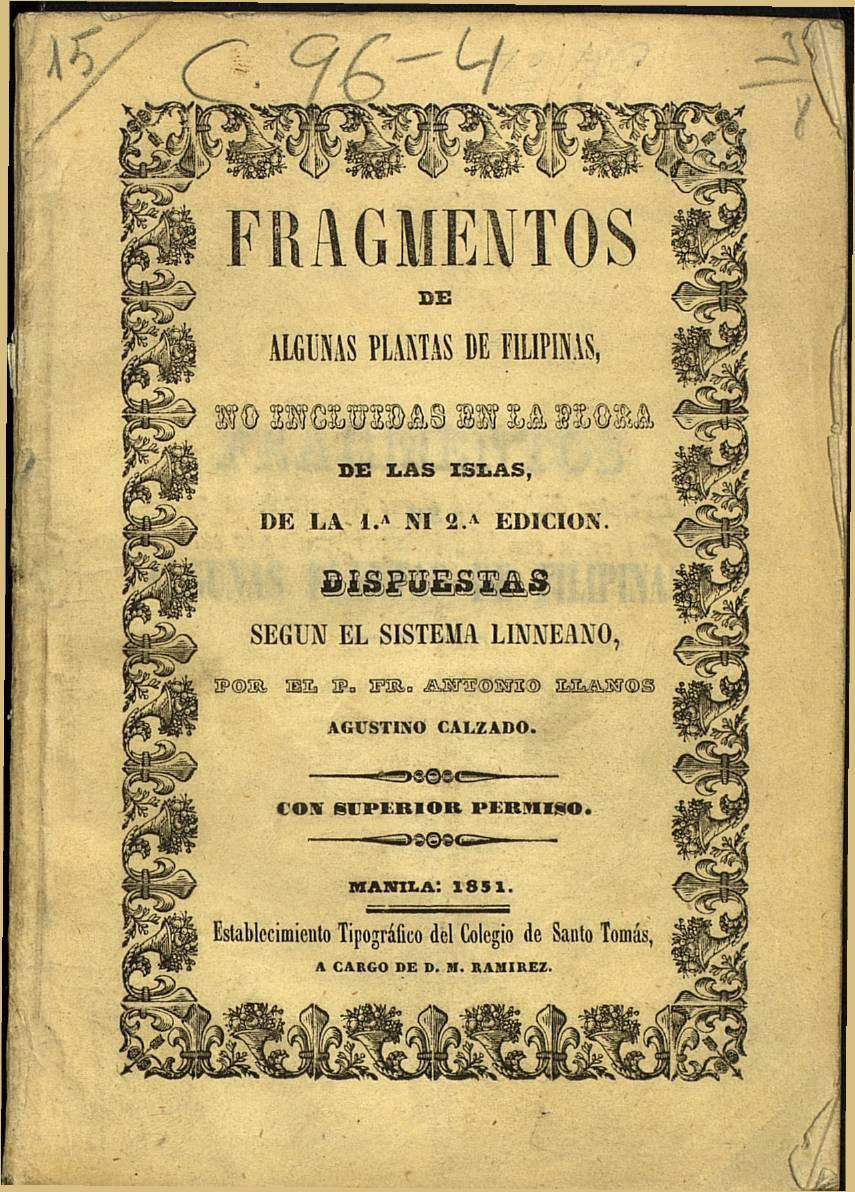 Antonio Llanos Aller (1806 - 1881): Fragmentos de algunas plantas de Filipinas, no incluidas en la flora de las islas, de la primera ni segunda edición (Manila, 1851)